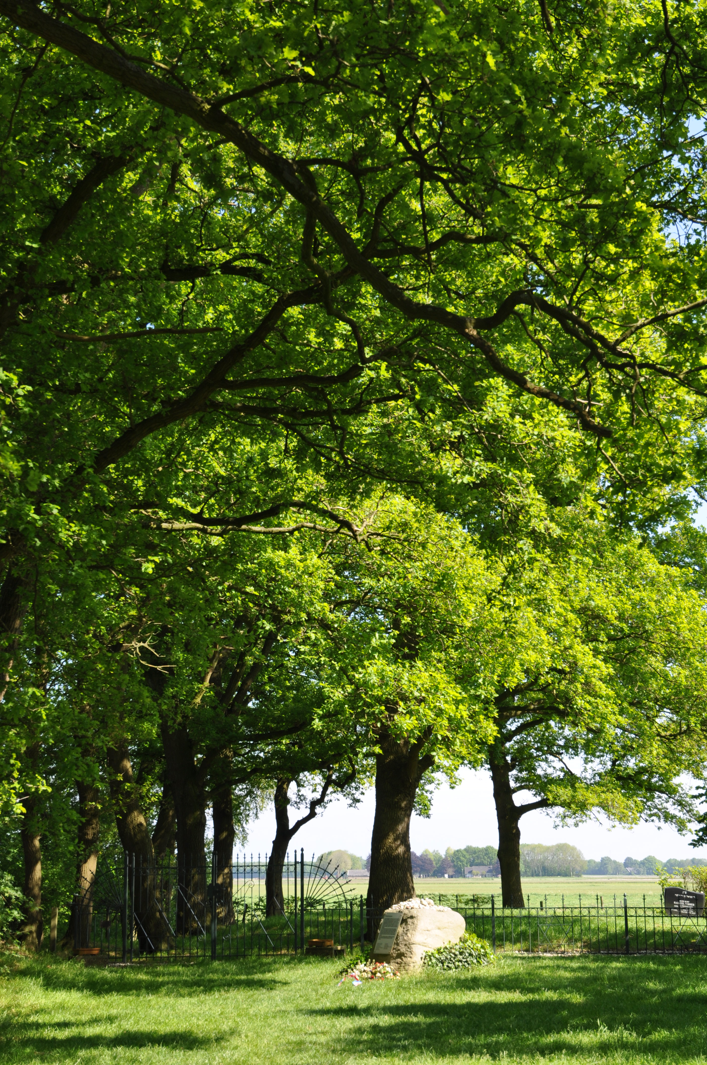 Joodse Begraafplaats Dalen.